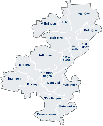 Grafik: Ulmer Stadtbezirke